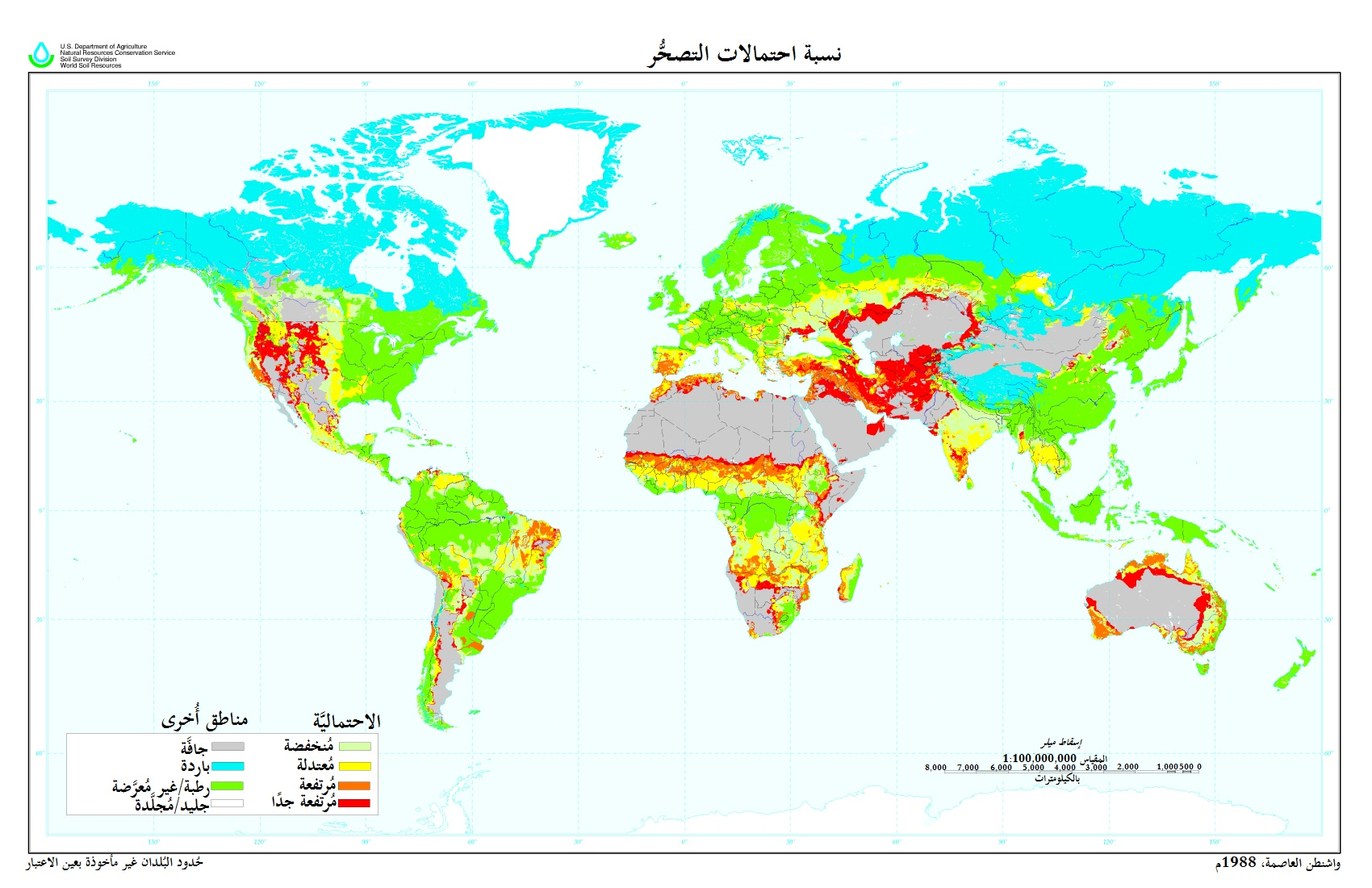 خارطة تُظهر نسبة مُعدَّلات التصحُّر في العالم عن الخريطة: تعتمدُ هذه الخريطة على إعادة تصنيف ورسم خارطة المُناخ العالمي وخارطة التُربة العالميَّة. استعمالات مُحتملة للخارطة: مُفيدة للأساتذة والتلاميذ المُهتمين بالتوزع العالمي للتصحُّر ومقدار نسبته وفق الموقع الجُغرافي. كما يُمكت استعمالها لإجراء تحليلات على مُستوىً بسيط.